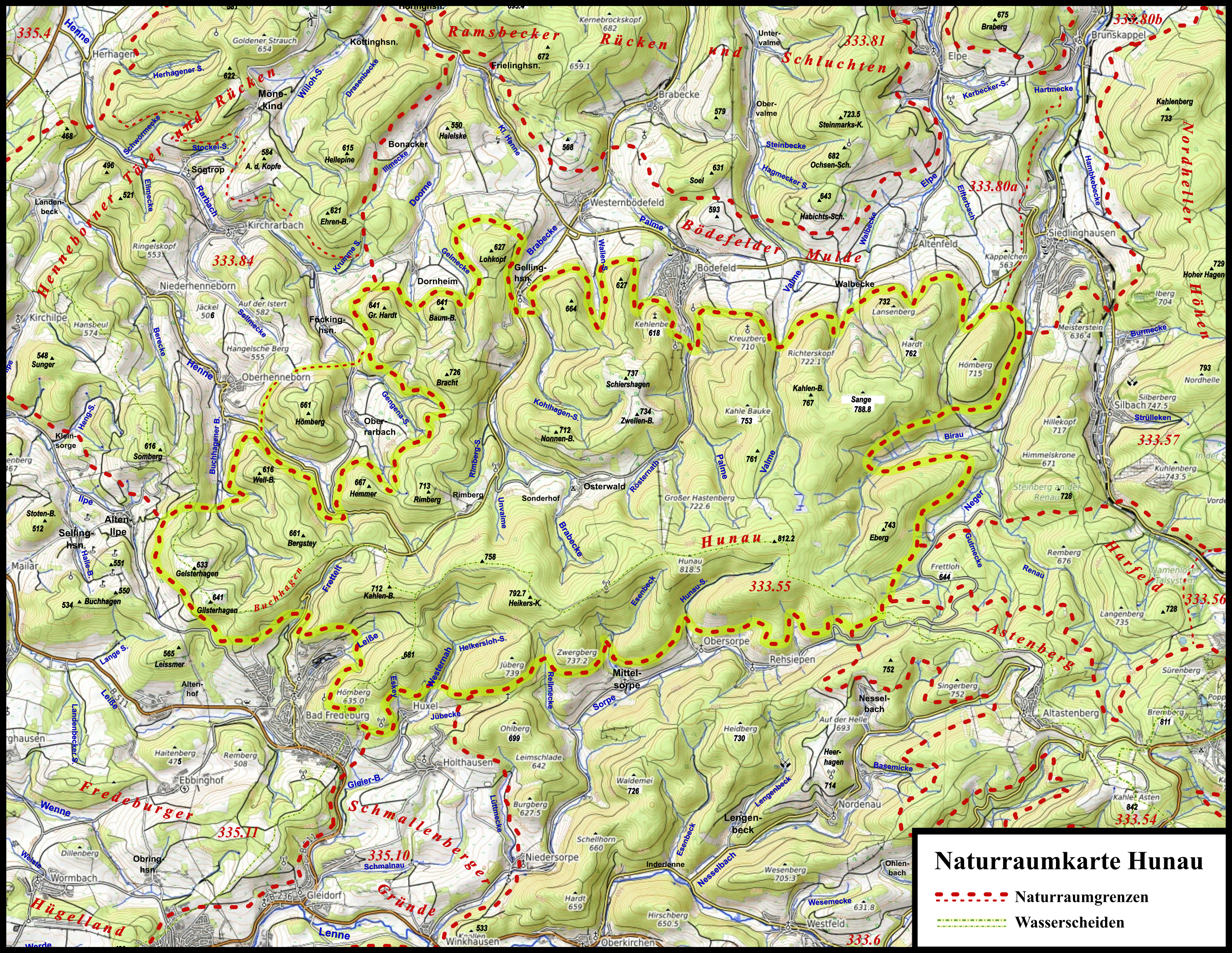 Naturraumkarte des bis 818,5 m hohen Naturraums Hohe Hunau östlich von Winterberg, nordöstlich von Bad Fredeburg und südlich von Bödefeld im Rothaargebirge nebst Nachbarnaturräumen; die "Konkurrenzberge" Kahler Asten (842 m, Südosten) und Nordhelle (793 m, Nordosten) sind im Ausschnitt enthalten.